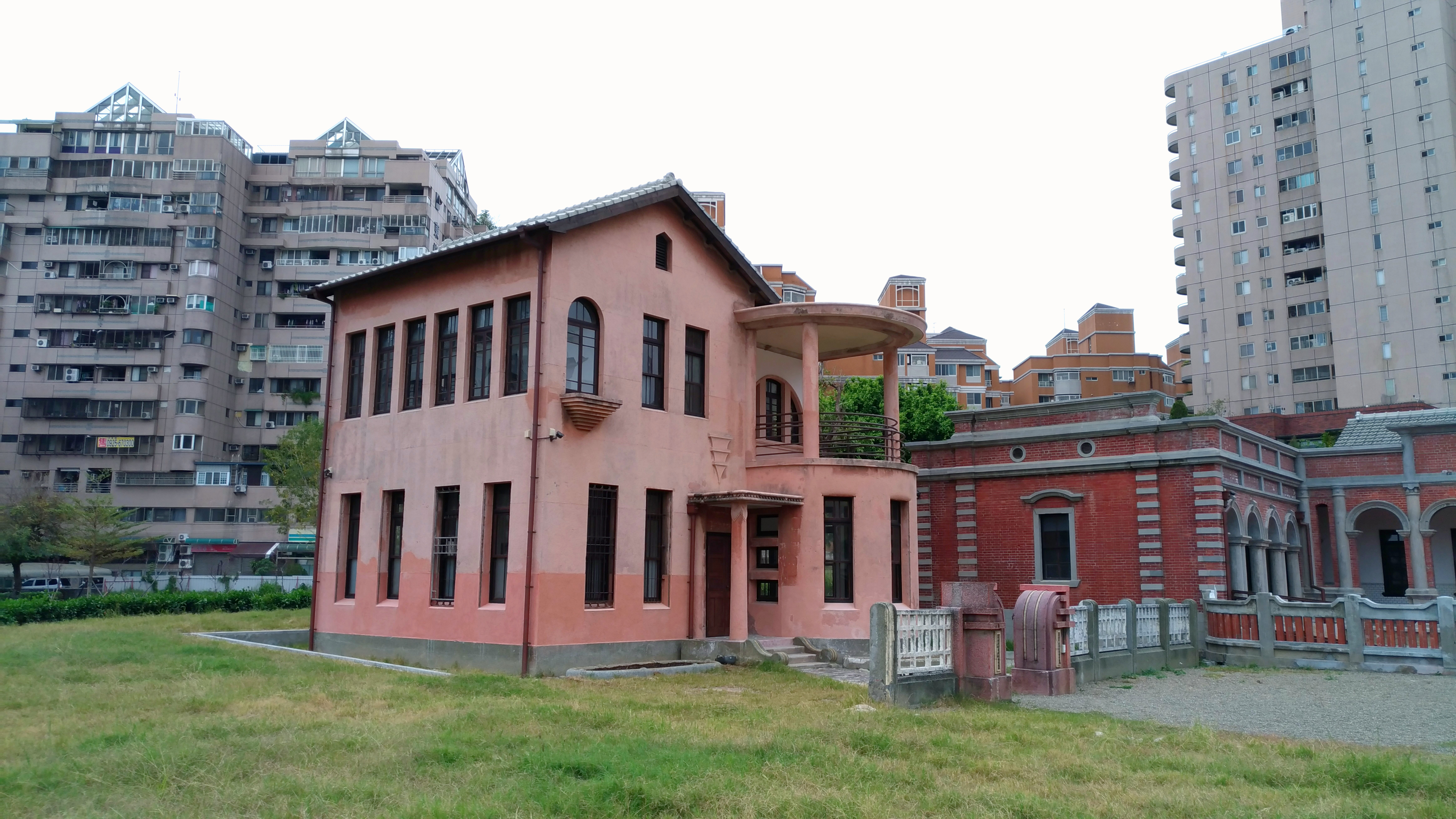 中文（台灣）: 林懋陽宅第左側洋樓